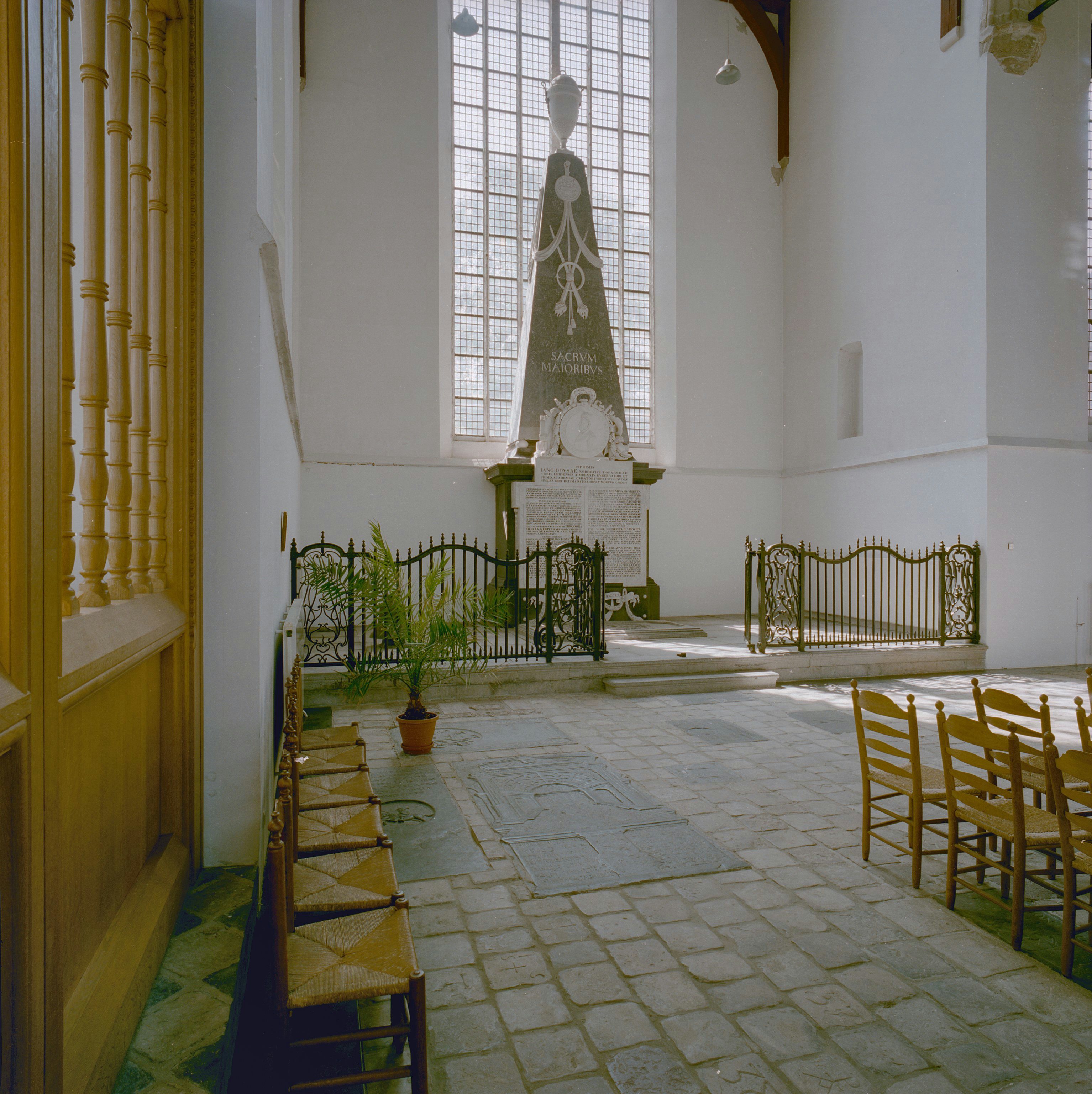 Hervormde Grote- of Sint Jeroenskerk: Interieur, overzicht grafmonument Janus Dousa in de zuid-dwarsschip